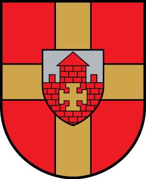 Krustpilsi piirkonna vapp.